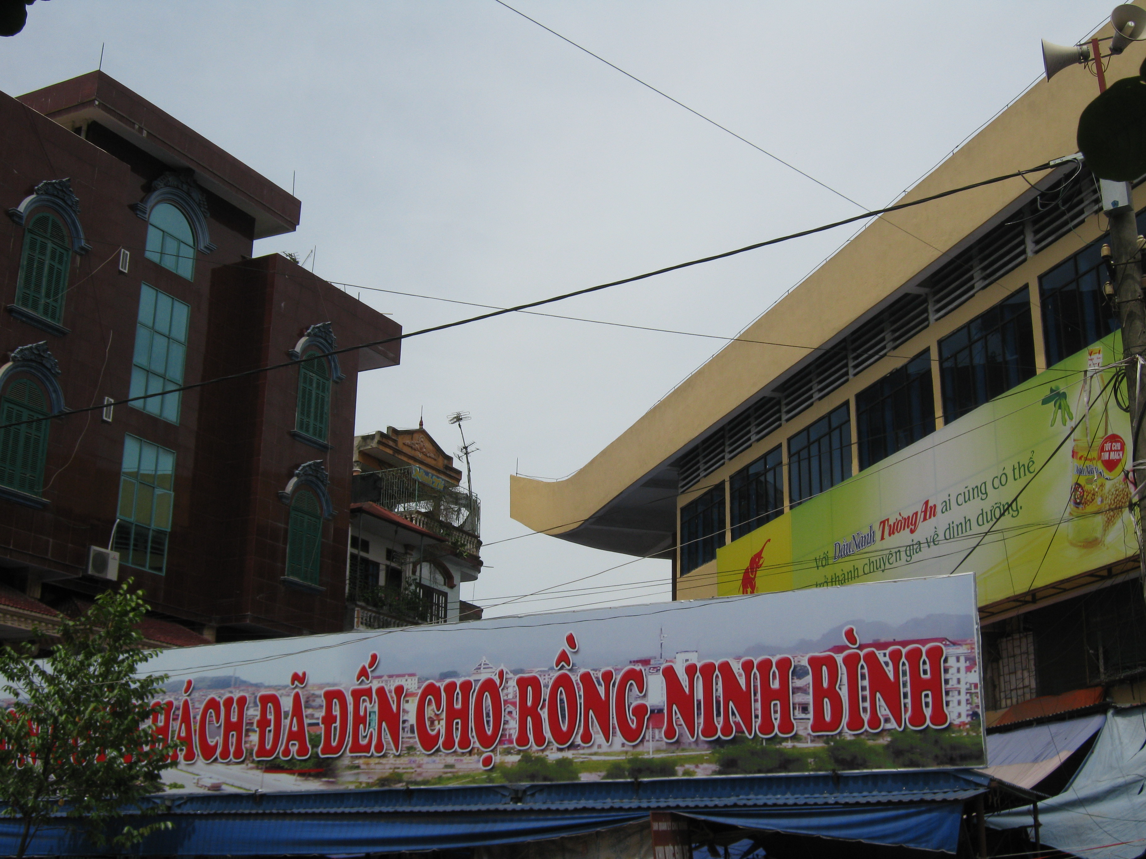 Chợ Rồng Ninh Bình tỉnh Ninh Bình